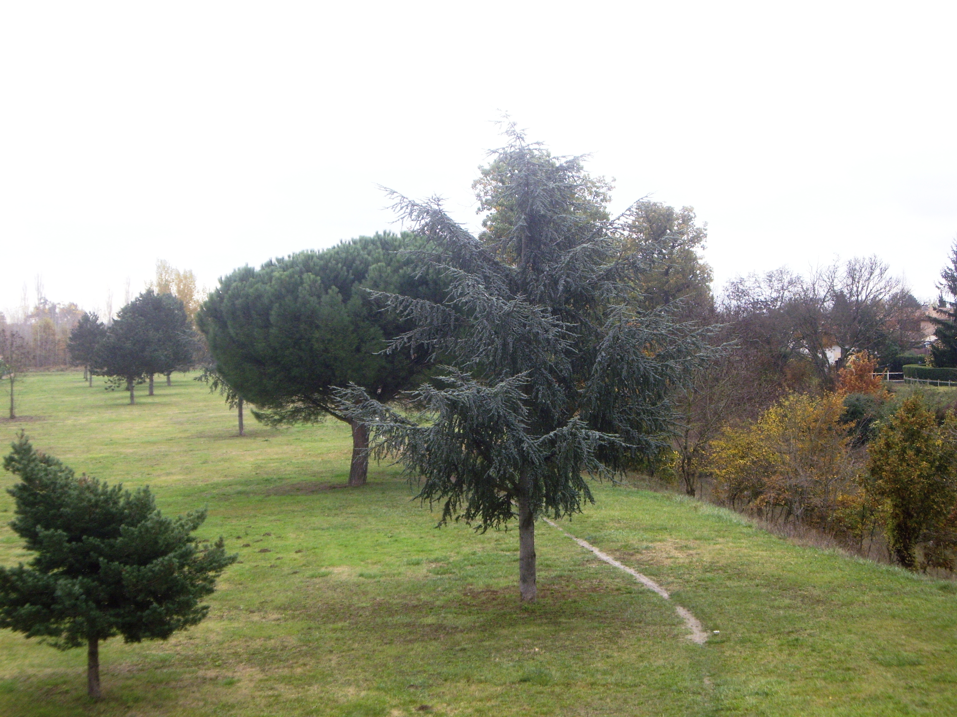 Rive droite de l'Hers-Mort à Fonbeauzard (Haute-Garonne, France).